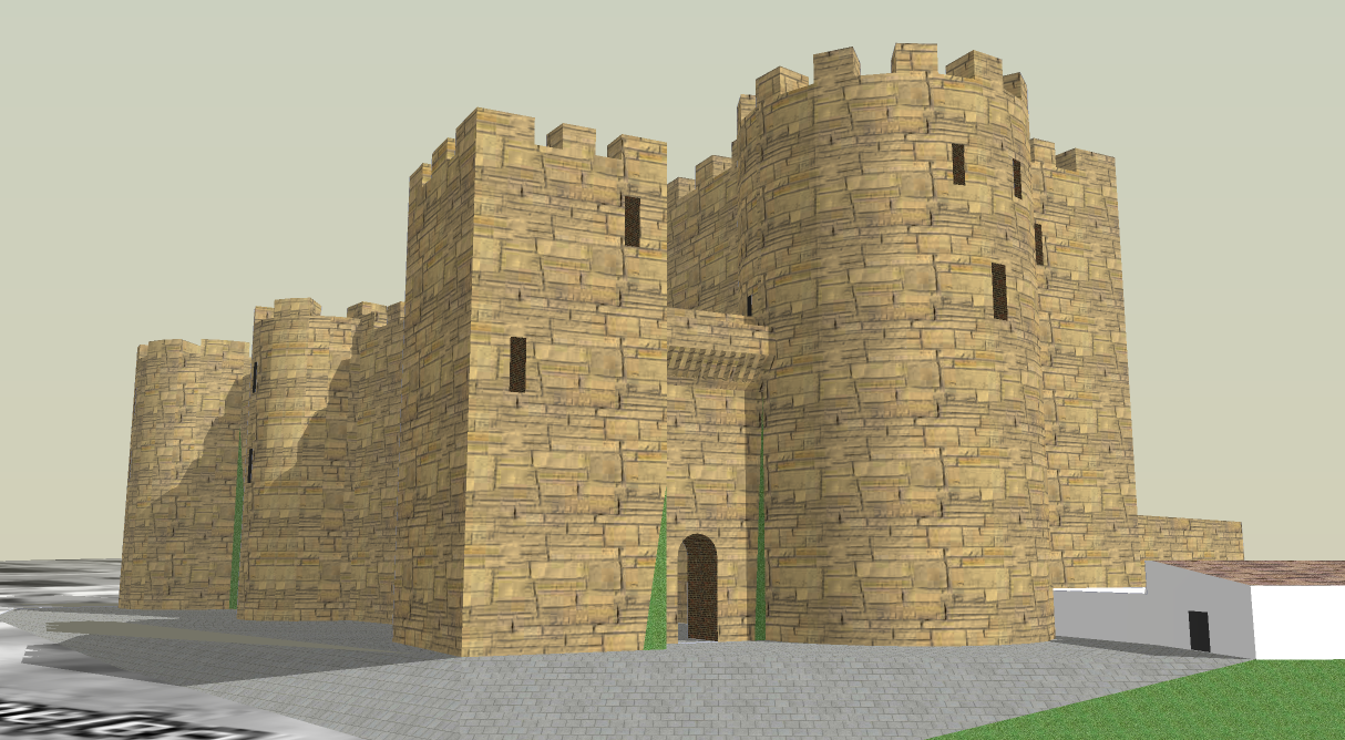 Reconstrucción digital en SketchUp del Castillo de la Villa en Cádiz por Caruel.